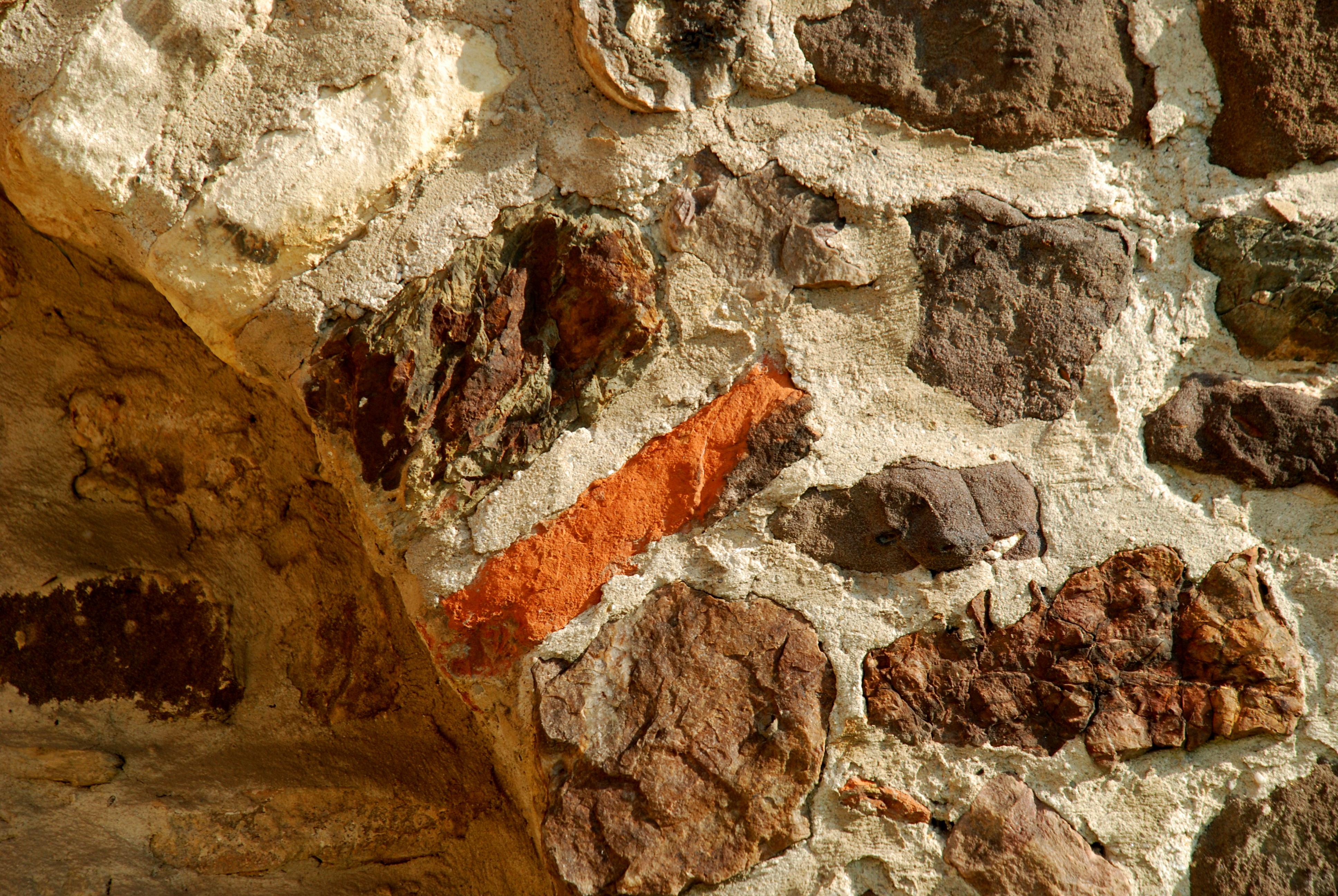 Belgique - Brabant wallon - Ottignies - Église Notre-Dame de Mousty